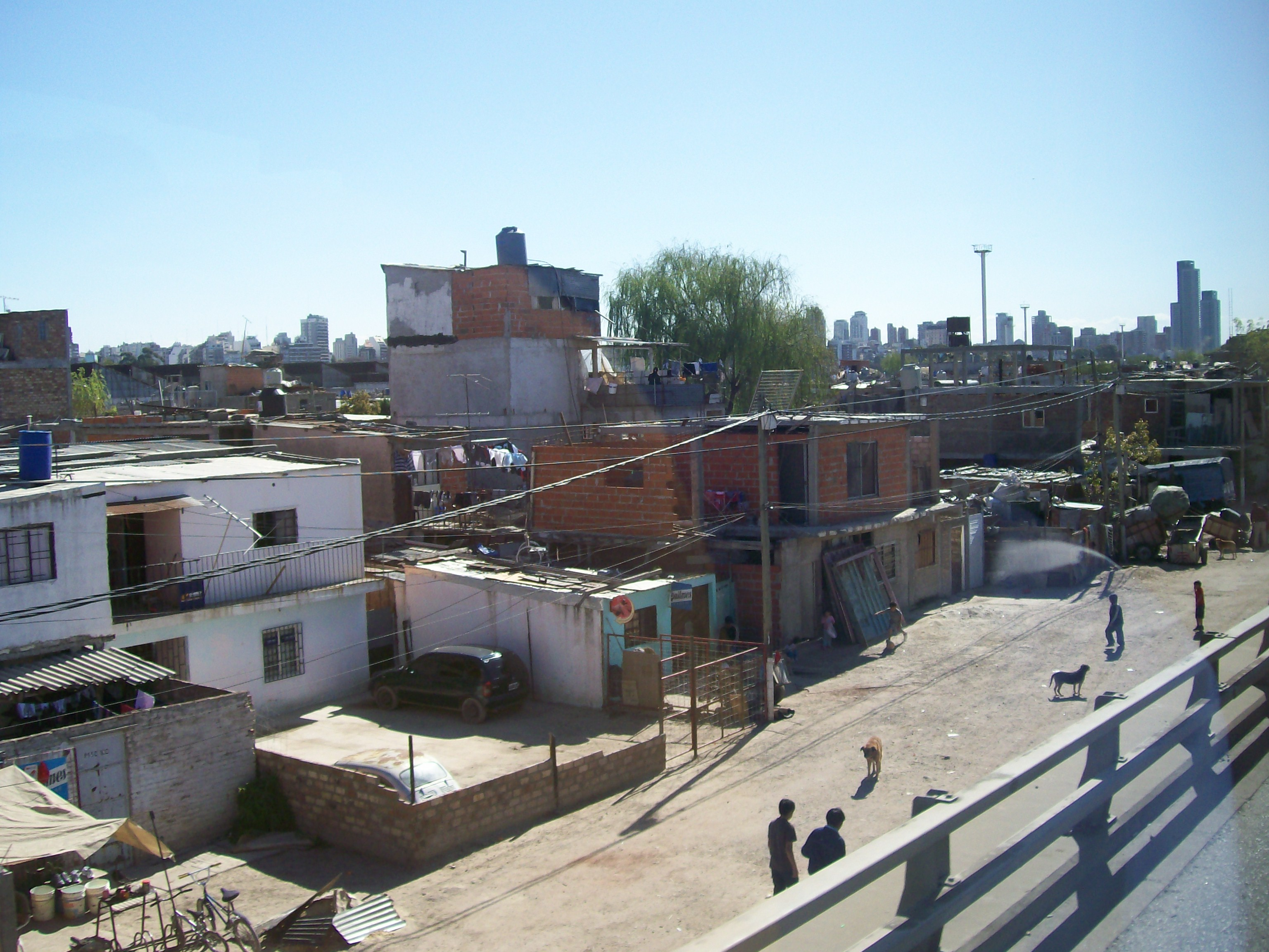 Villa miseria en Retiro, Argentina